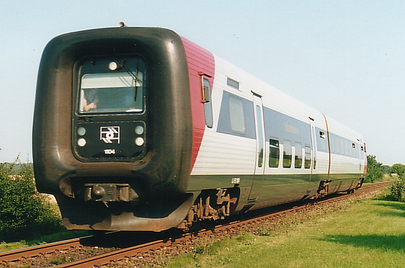 Lollandsbanen IC2 DMU near Krungerup on Lolland, Denmark